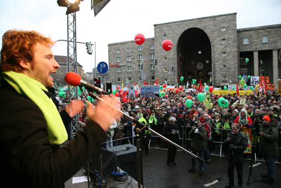 Hannes Rockenbauch vom Aktionsbündnis gegen Stuttgart 21 begrüßt die linken Demonstrationsteilnehmer, darunter Parteichefin Gesine Lötzsch und den Vorsitzenden der Bundestagsfraktion, Gregor Gysi.